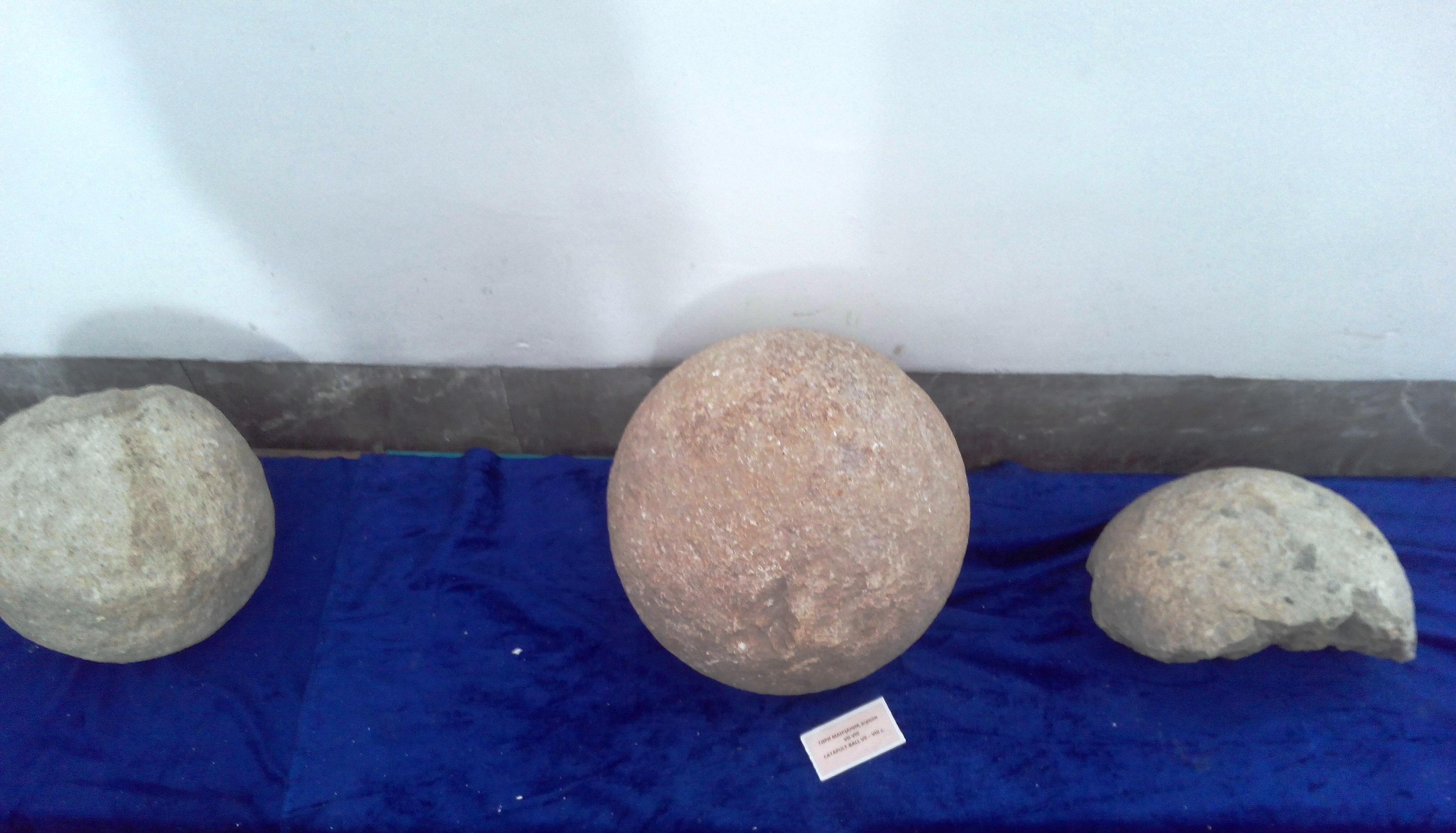 Гиссарская крепость. Экспонаты Гиссарского историко-краеведческого музея. Тоҷикӣ: Қалъаи Ҳисор. Экспонатҳои Осорхонаи таърихӣ-кишваршиносии ноҳияи Ҳисор